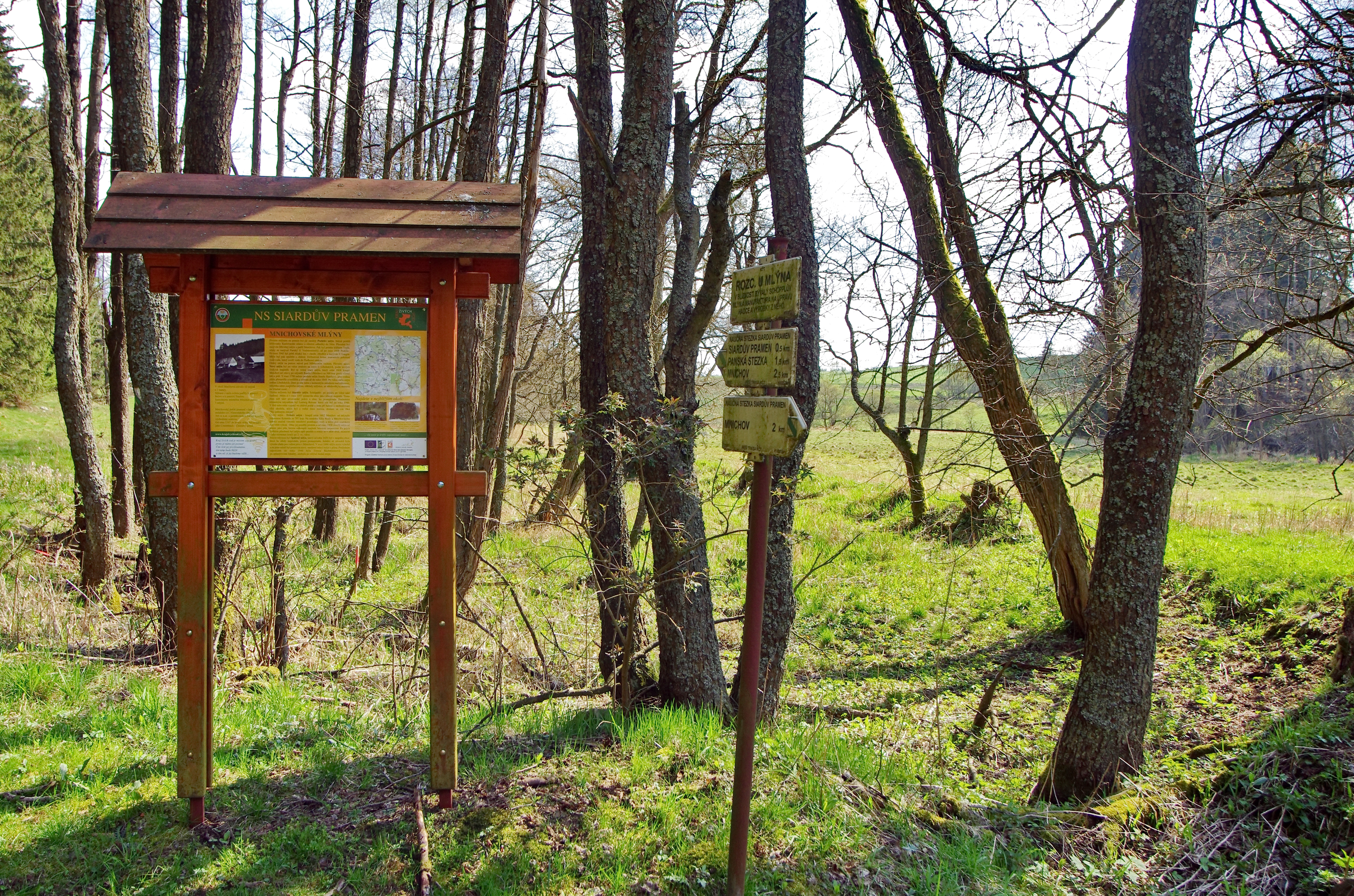 Infotabule na naučné stezce Siardův pramen, informuje o historii mlýnů na Mnichovském potoce, Mnichov, okres Cheb